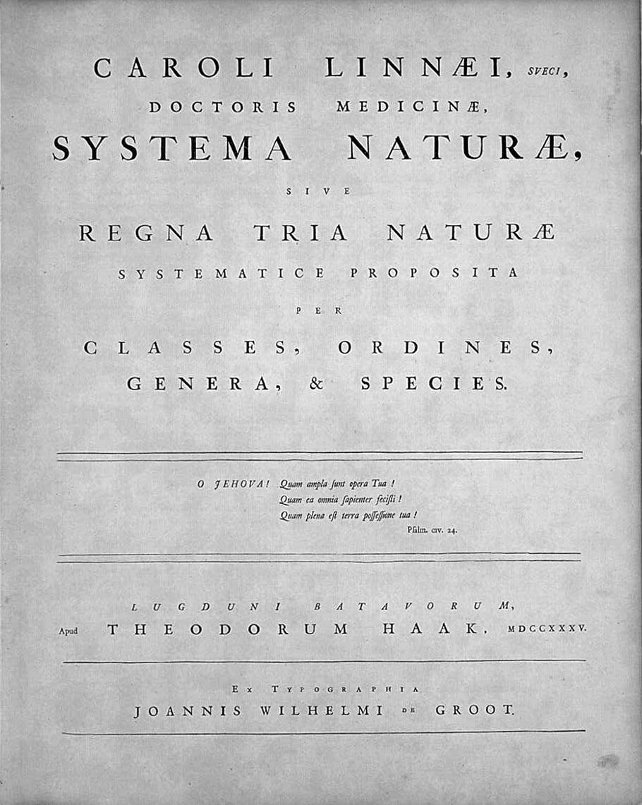 Titelblatt der 1. Auflage von Linnés Systema Naturae